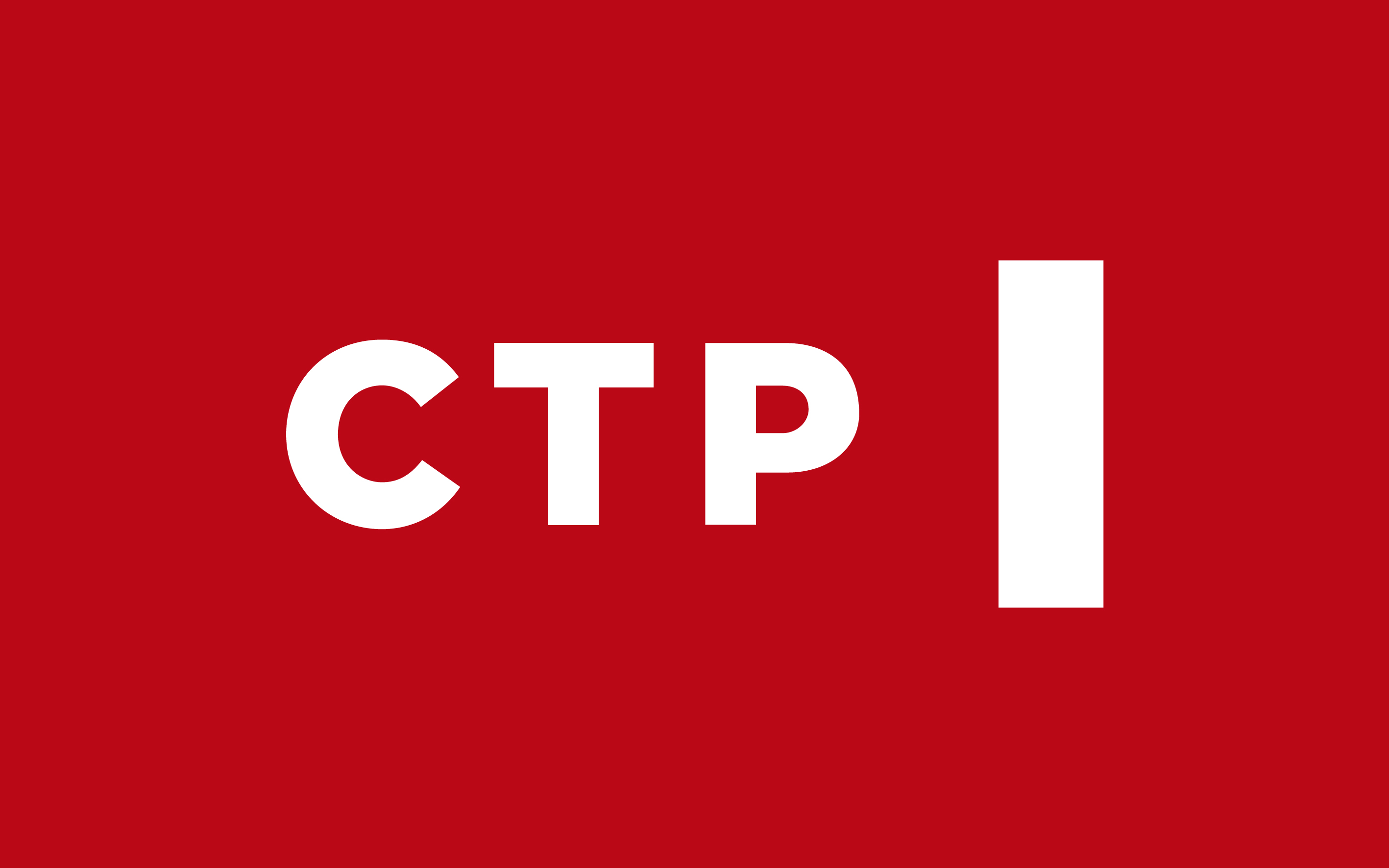 CTP logo